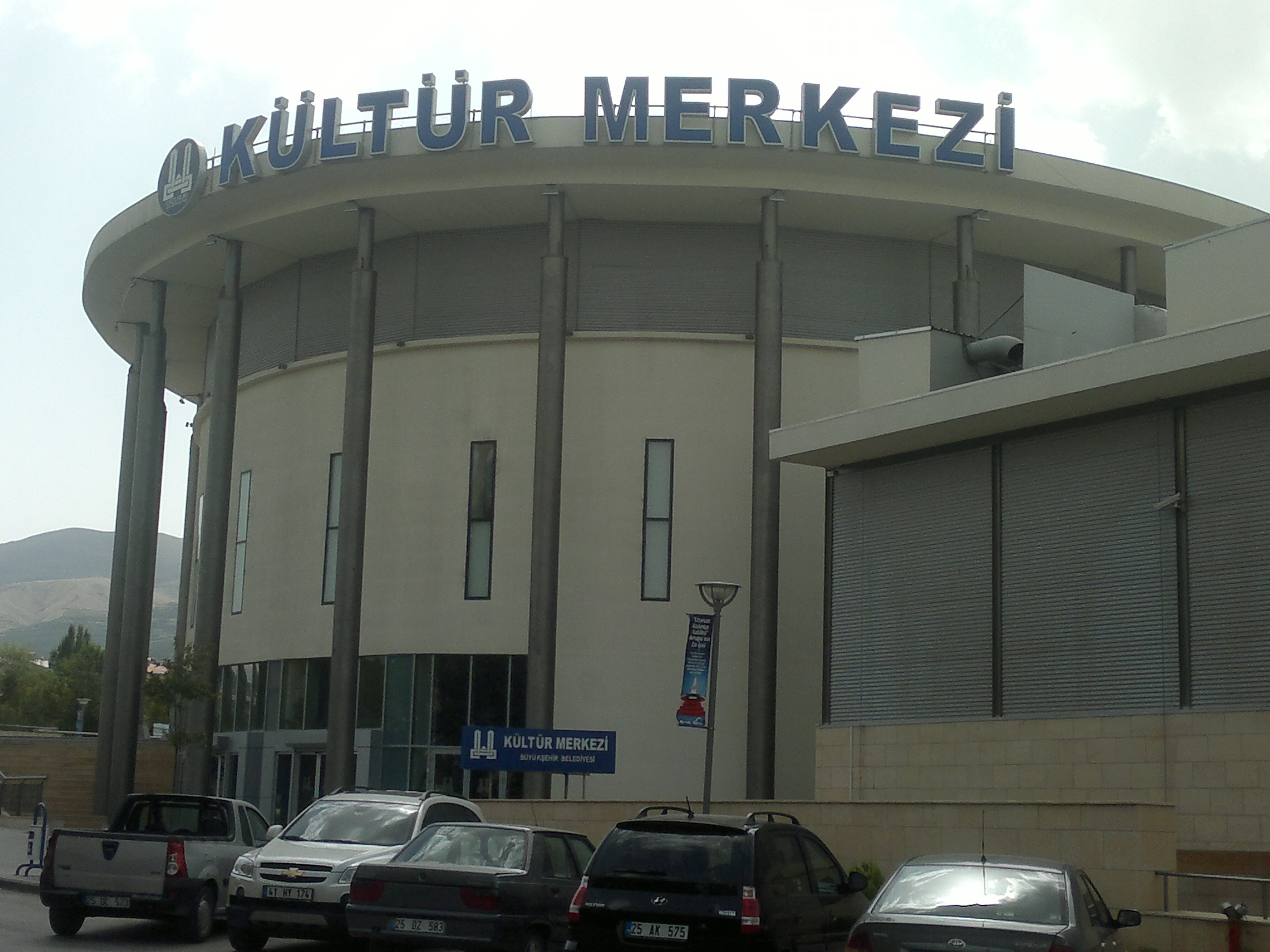 Erzurum Kültür Merkezi